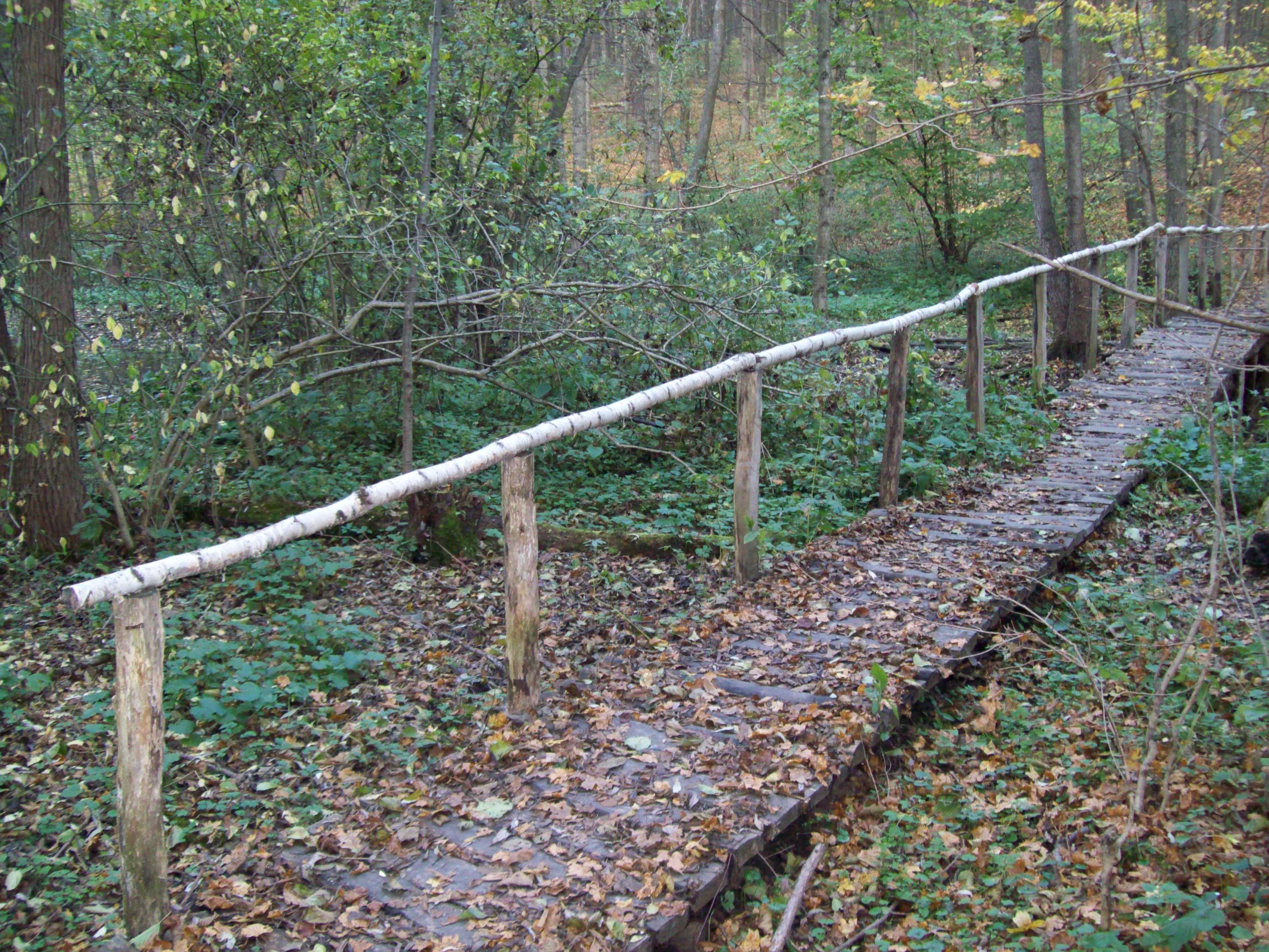 Ліс на хмельниччині, біля Хмільника